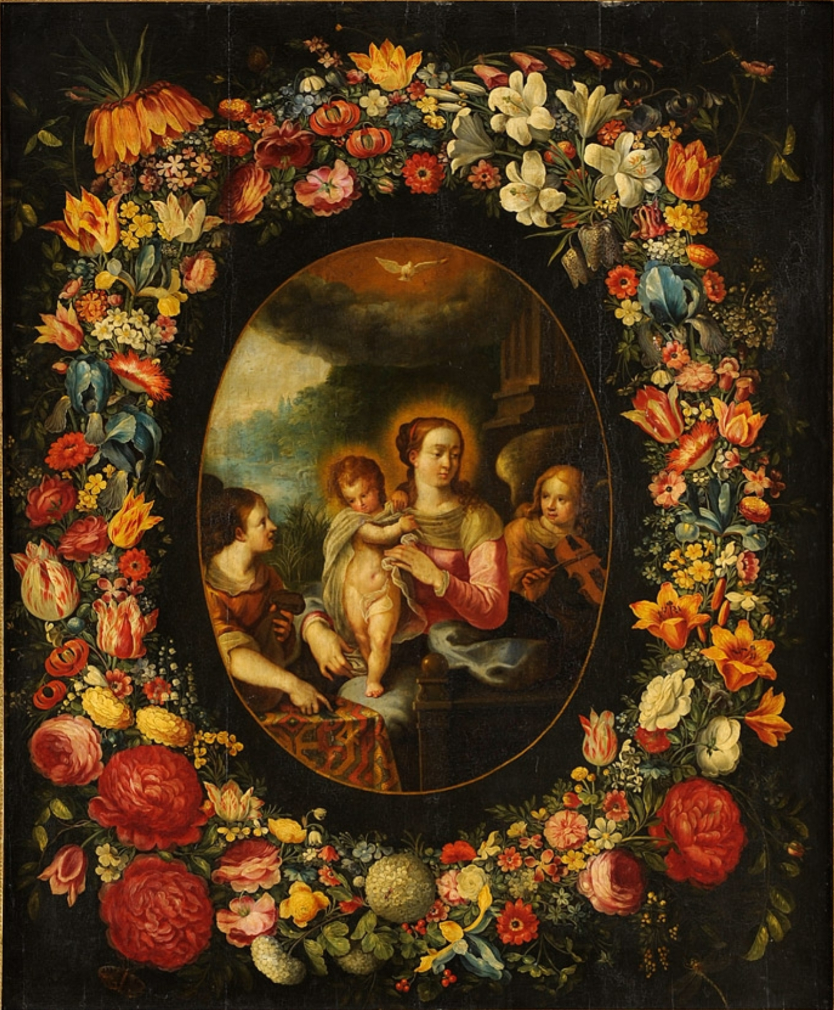 Madonna mit Kind im Blumenkranz. Öl auf Holz, 112 x 90 cm.